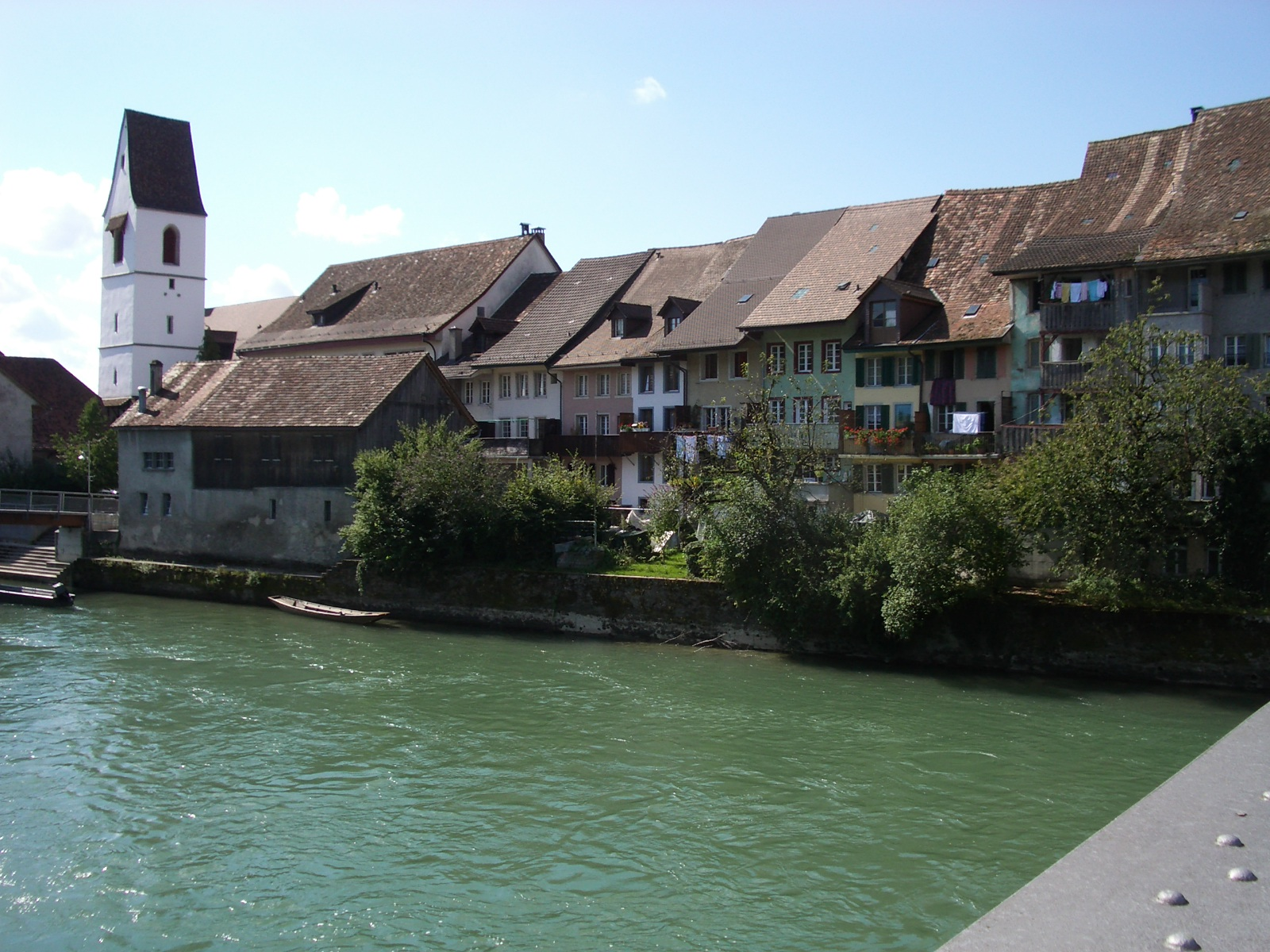 Mellingen AG, Switzerland self-made, August 2006